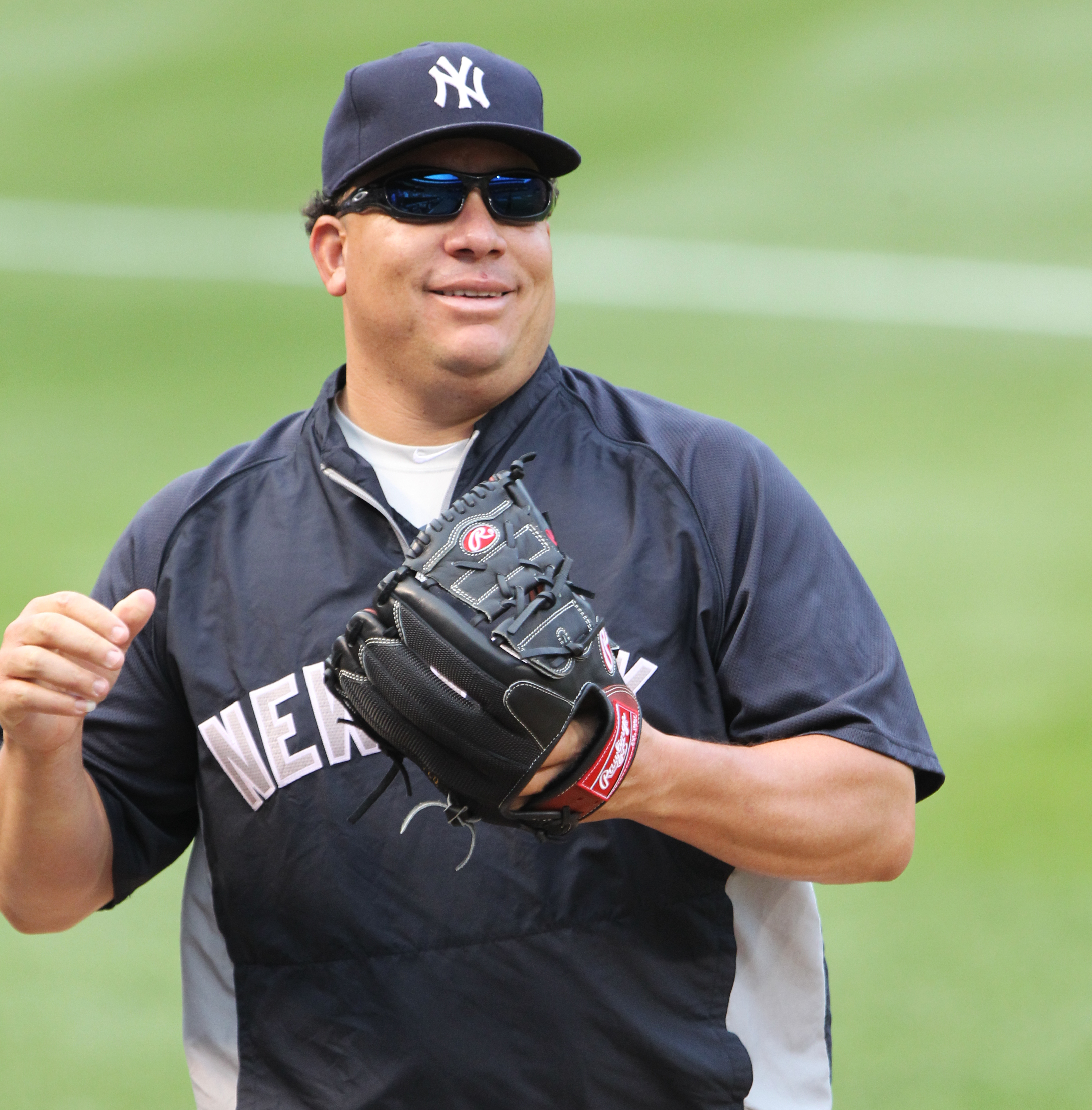 Yankees at Orioles August 29, 2011